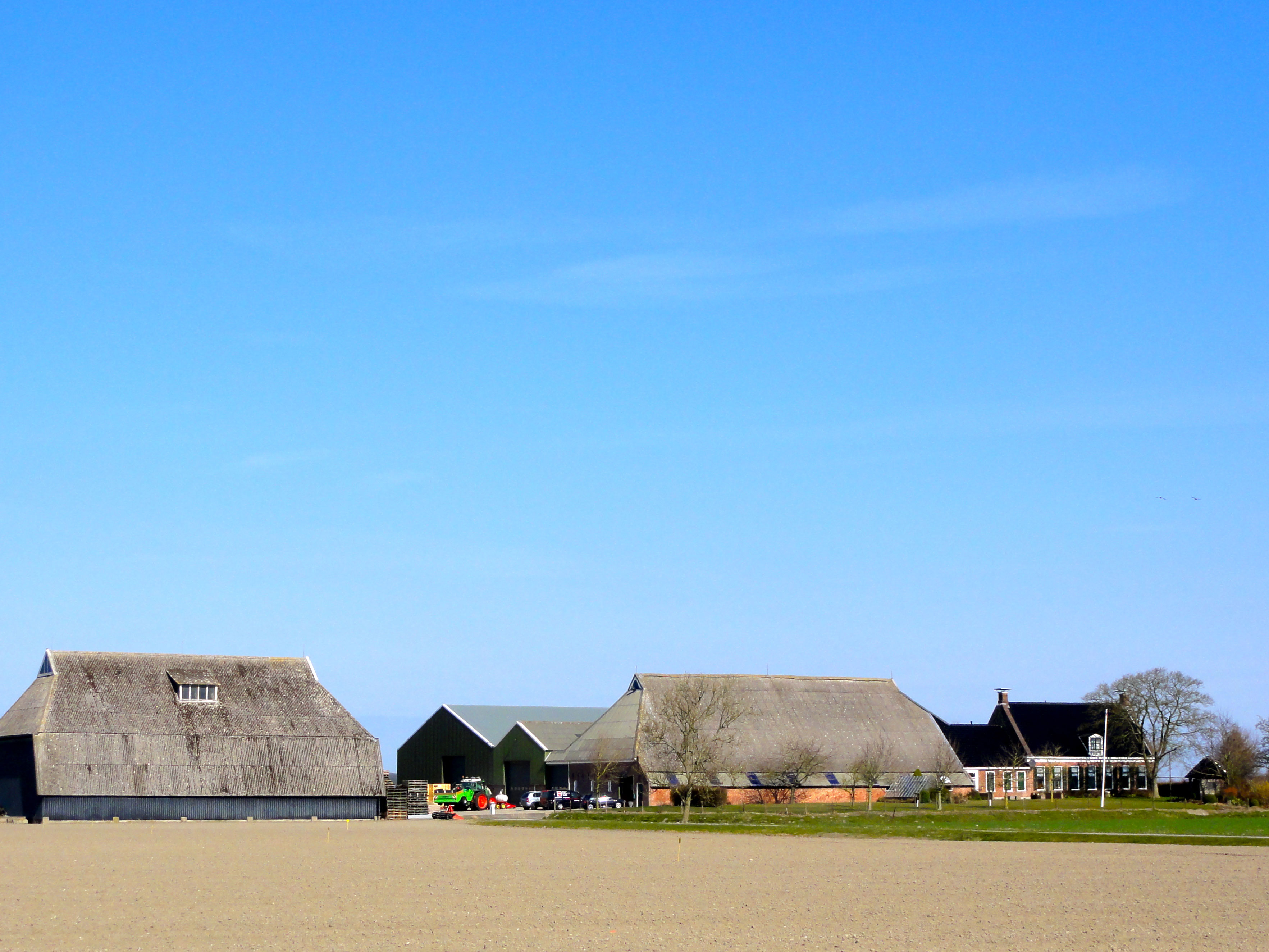 Boerderij Langenhuis nabij Doodstil